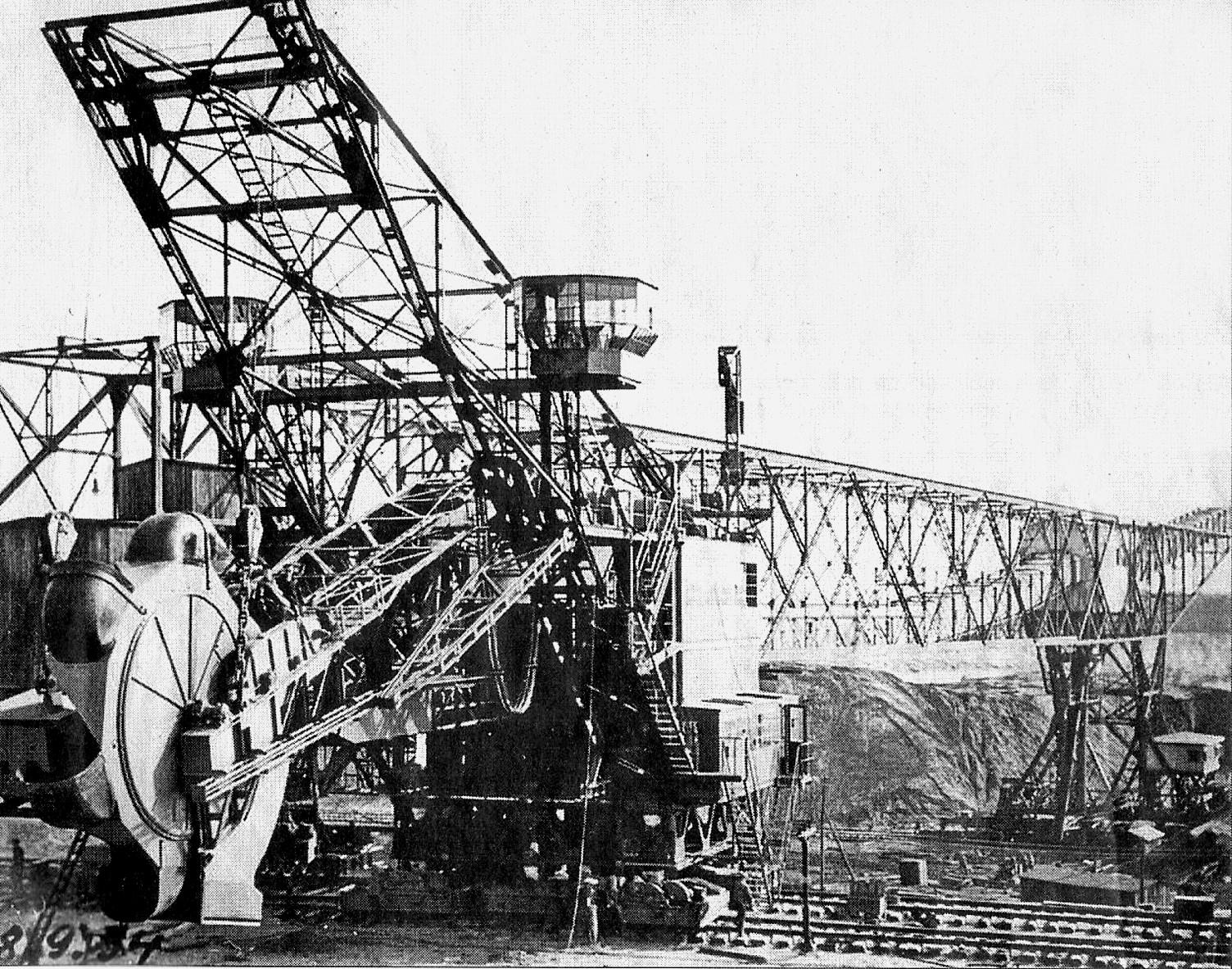 Die erste Abraumförderbrücke der Welt (mit Schaufelradbagger vorne) in der Grube Agnes in Plessa